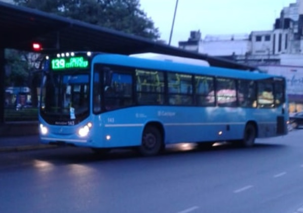 Mercedes-Benz O-500 de la empresa El Cacique, que explota la línea 139